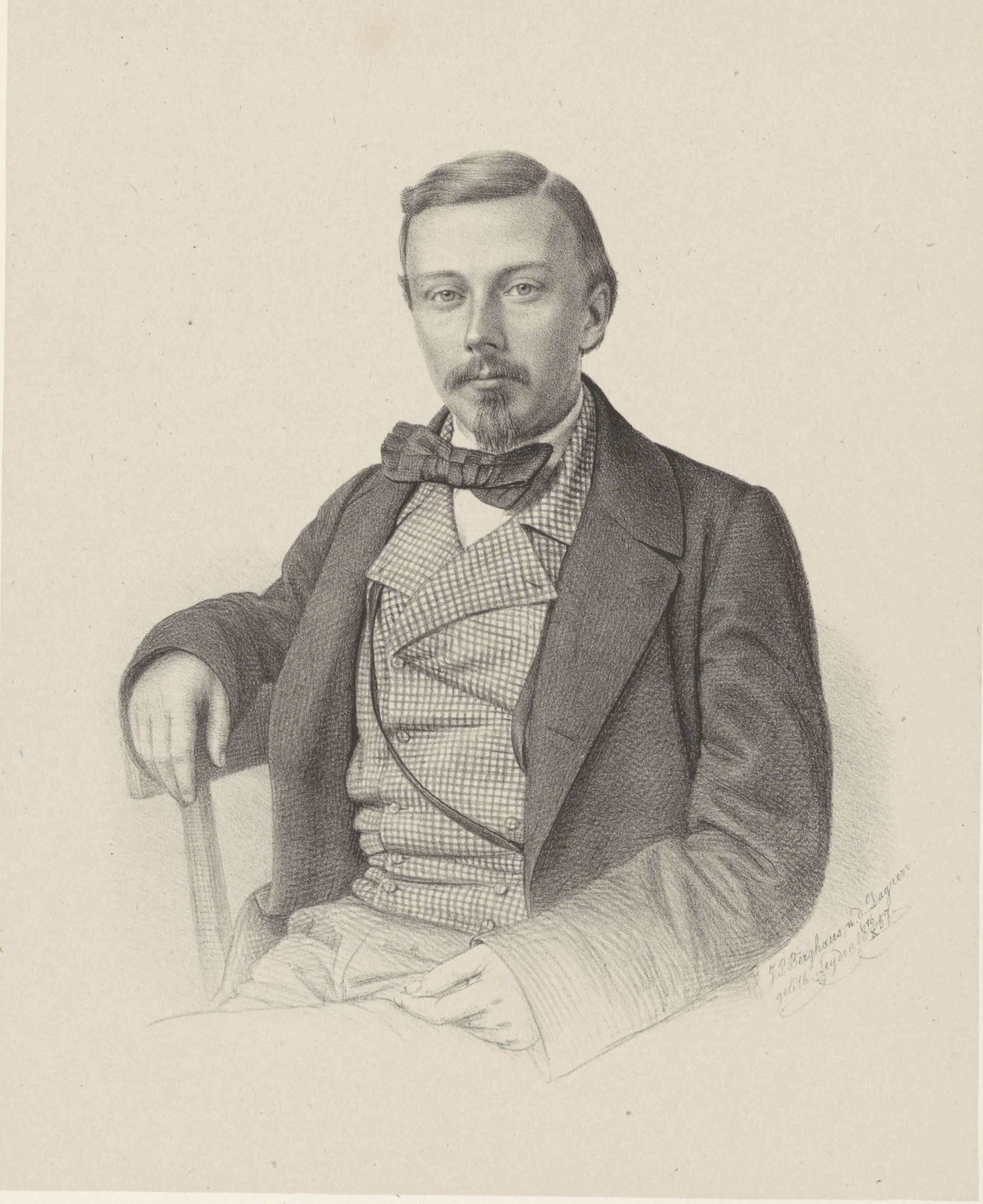 IdentificatieTitel(s): Portret van Eelco VerwijsObjecttype: prent Objectnummer: RP-P-1910-1931Catalogusreferentie: Van Someren 5805Opschriften / Merken: verzamelaarsmerk, verso, gestempeld: Lugt 2228Omschrijving: De geportretteerde zit gedraaid op een stoel en leunt met zijn rechterarm op de rugleuning. Hij draagt een geruit vest.Fysieke kenmerken: lithografie op chine colléMateriaal: papier chine collé Techniek: lithografie (techniek)Afmetingen: blad: h 435 mm × b 346 mmOnderwerpWat: historical personsWie: Eelco VerwijsVerwerving en rechtenVerwerving: aankoop 1910Copyright: Publiek domein